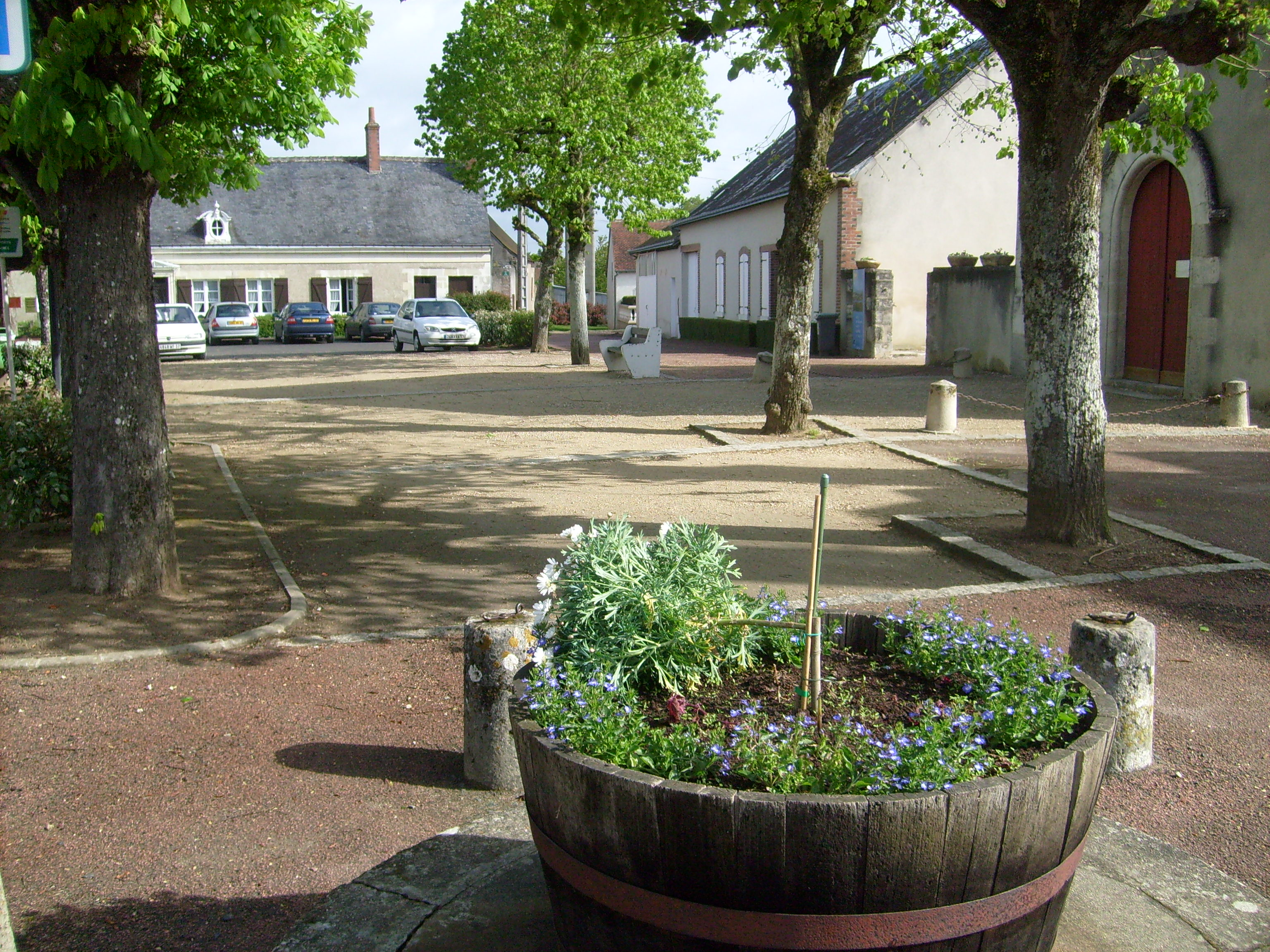 Place de Dame Marie les Bois